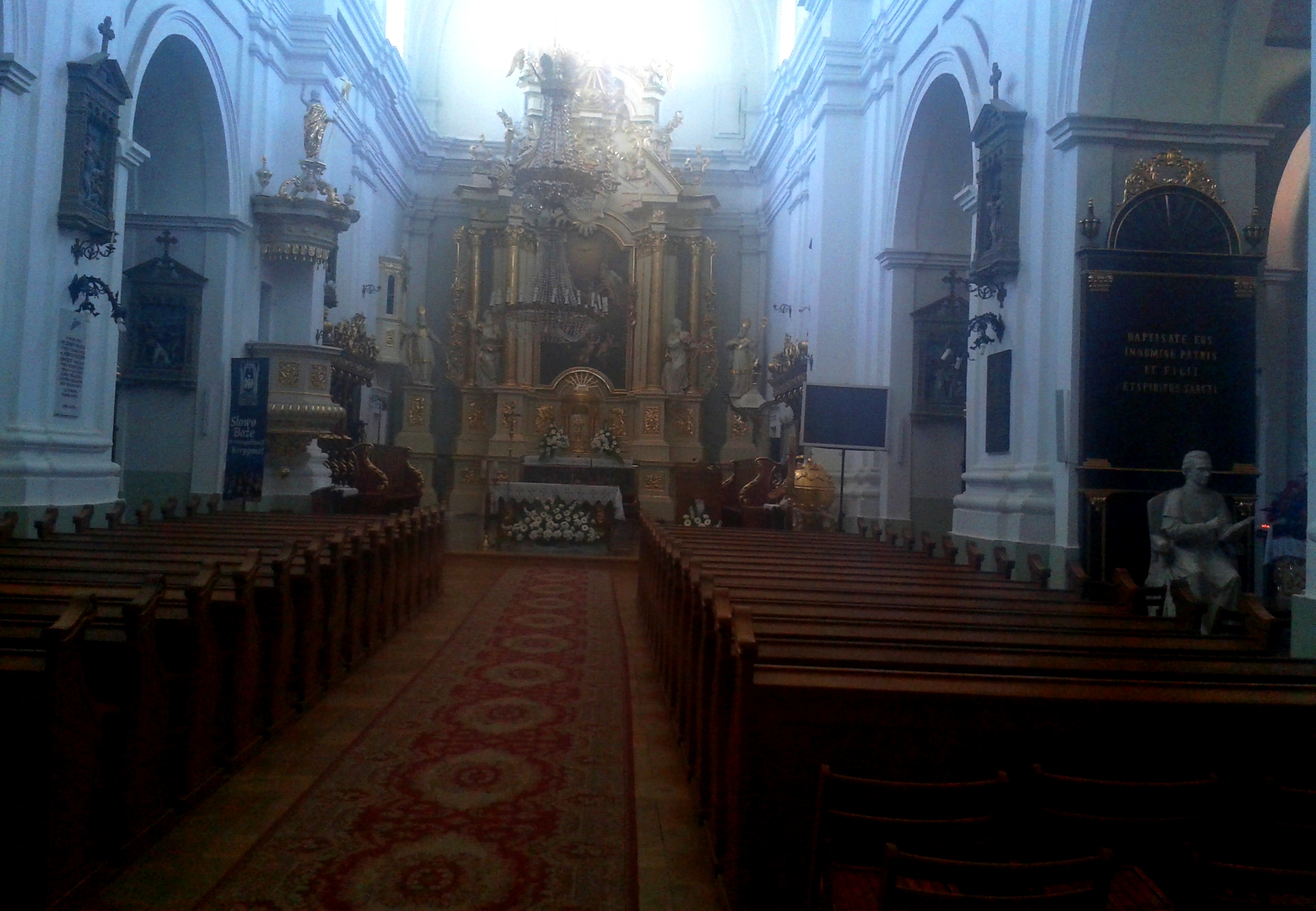 Wnętrze katedry w Janowie Podlaskim. Po prawej widoczny nagrobek biskupa Adama Naruszewicza